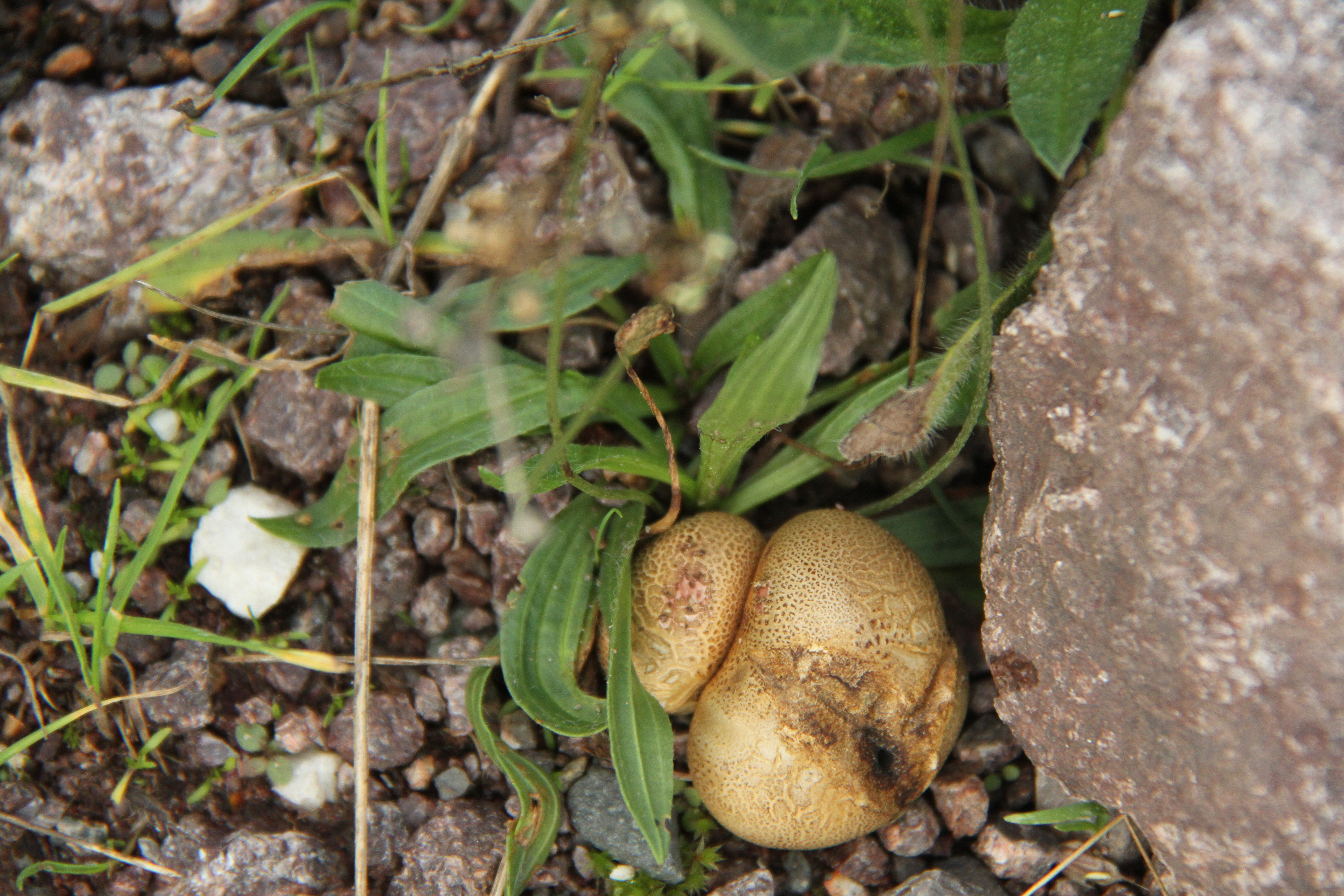 En potetrøyksopp